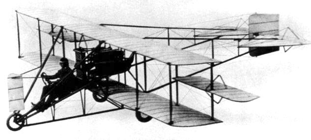 Avión Martin Pusher fabricado por Glenn L. Martin llamado Sonora